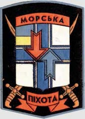 ukramarine09